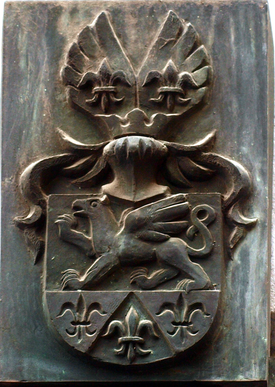 Palác Platýz - erb Plattenštejnů